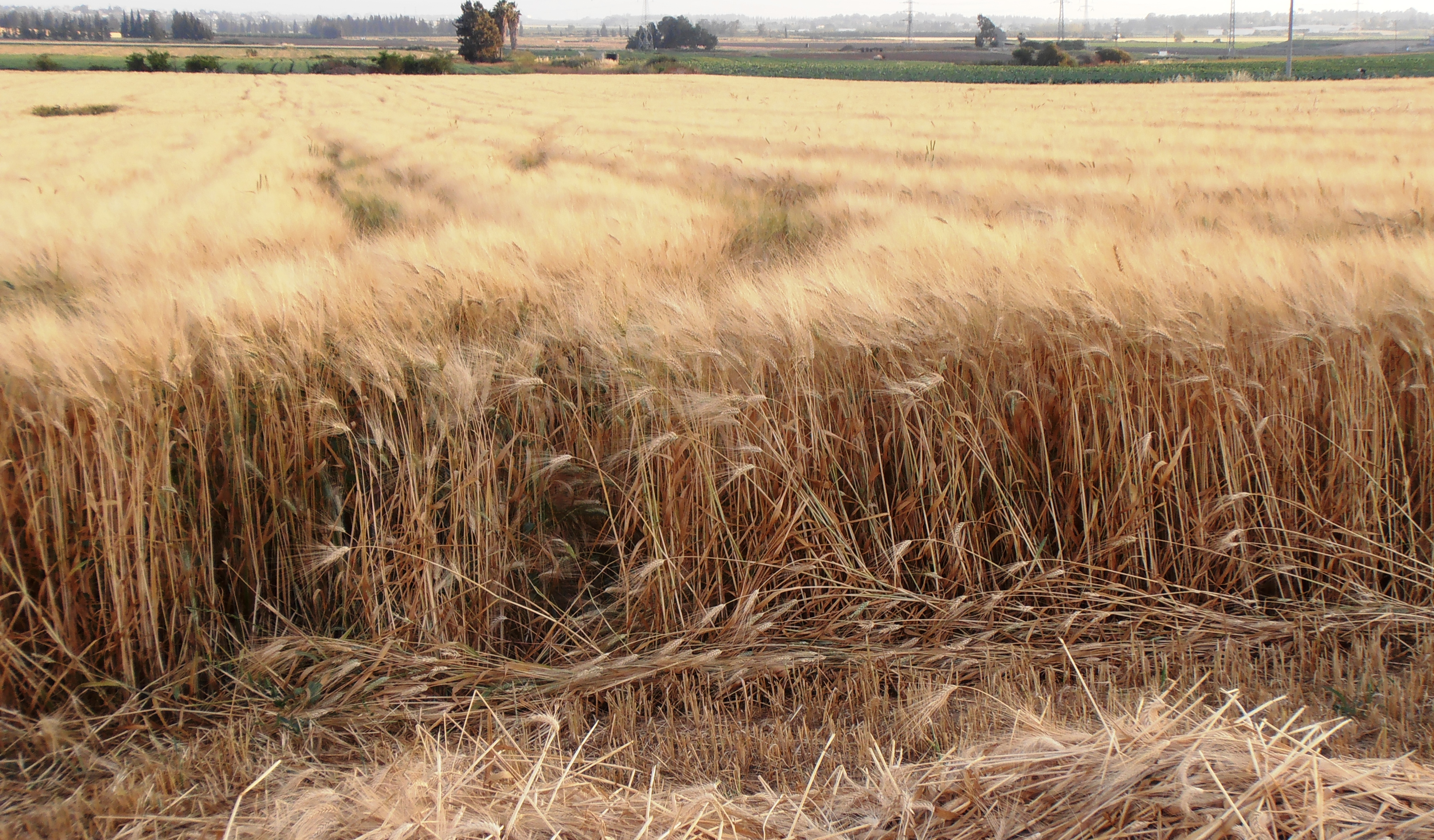 Wheat Fields; Near Givat Brenner, Israel שדות חיטה; ליד גבעת ברנר